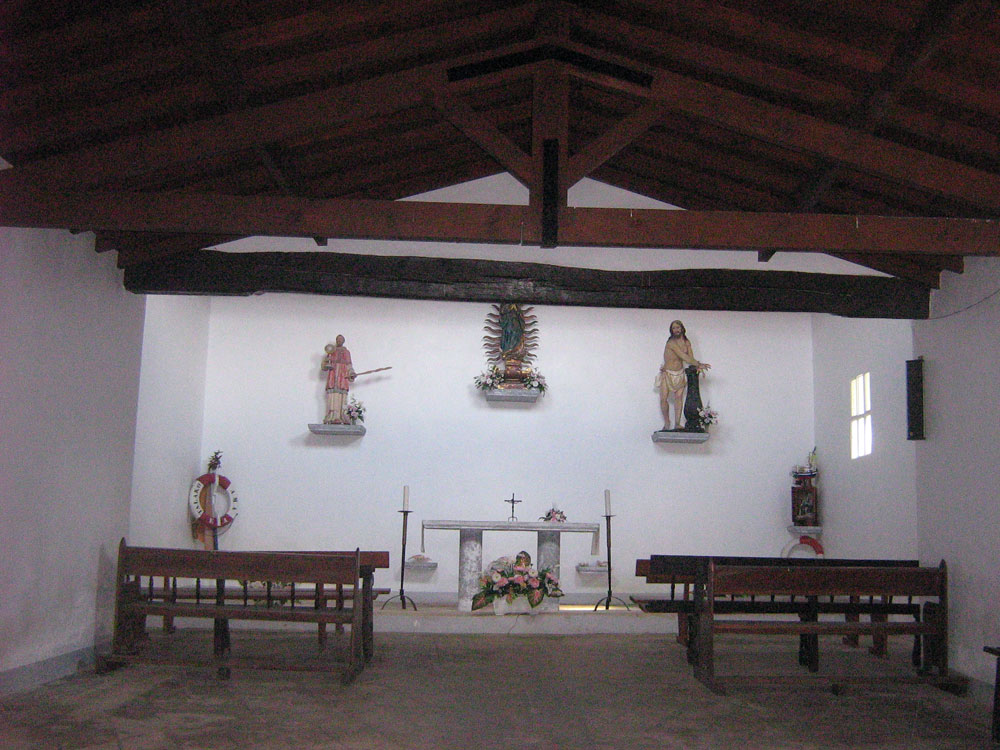 Interior de la Ermita Talako Ama, en Ea (Vizcaya)